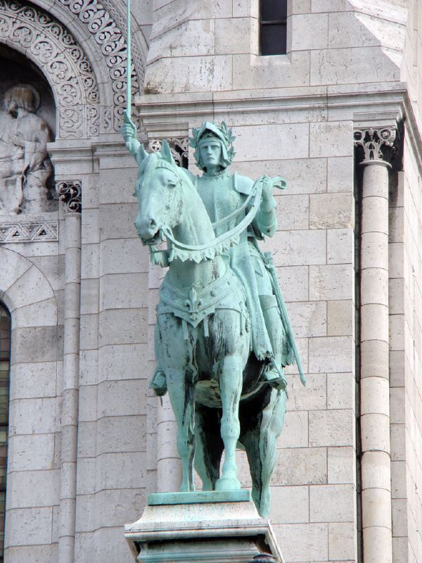 Equestrian Statue of Joan of Arc at Basilique du Sacré-Cœur, sculptor Hippolyte Jules Lefèbvre (1863-1935)